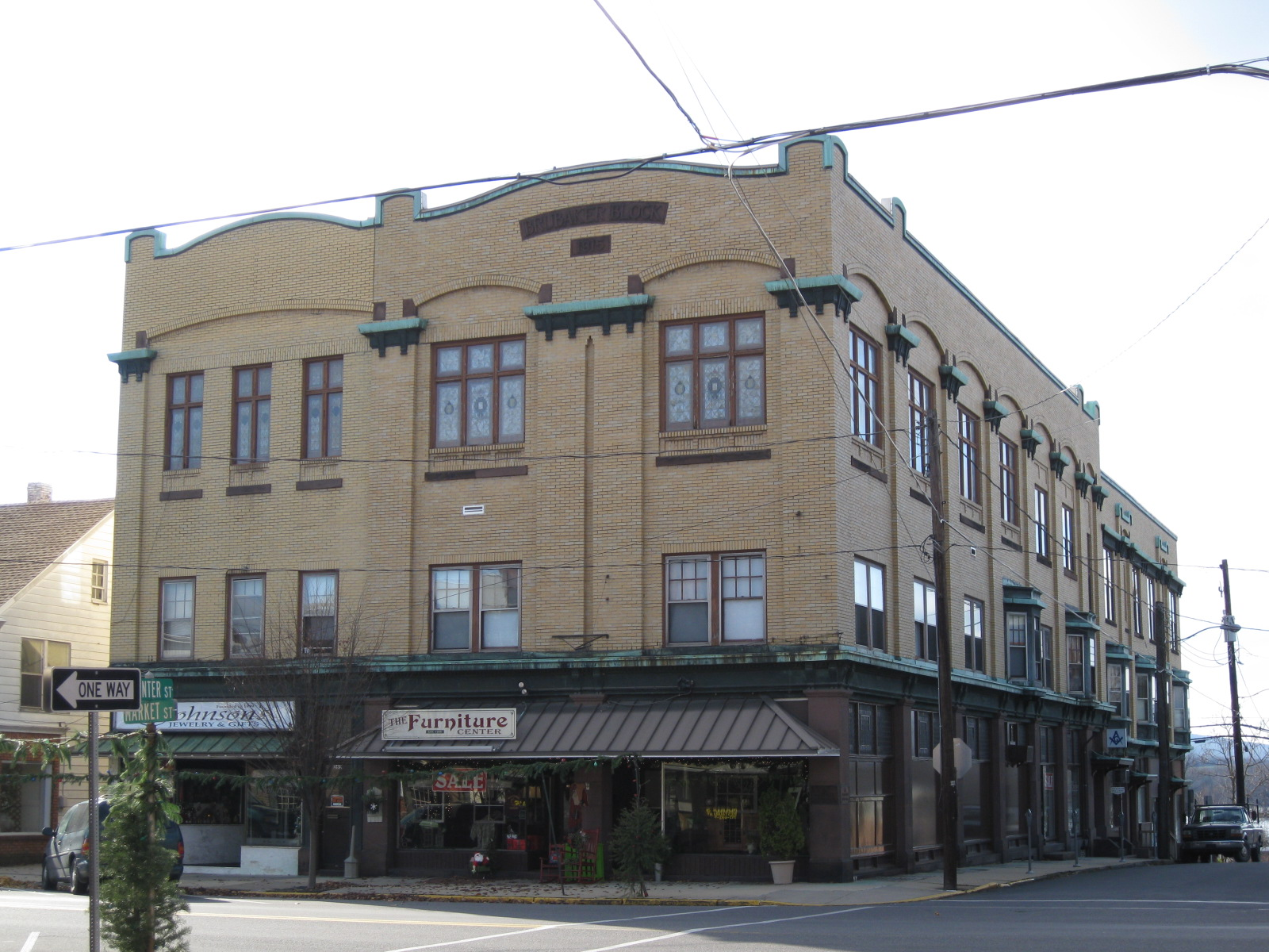 Millersburg, Pennsylvania